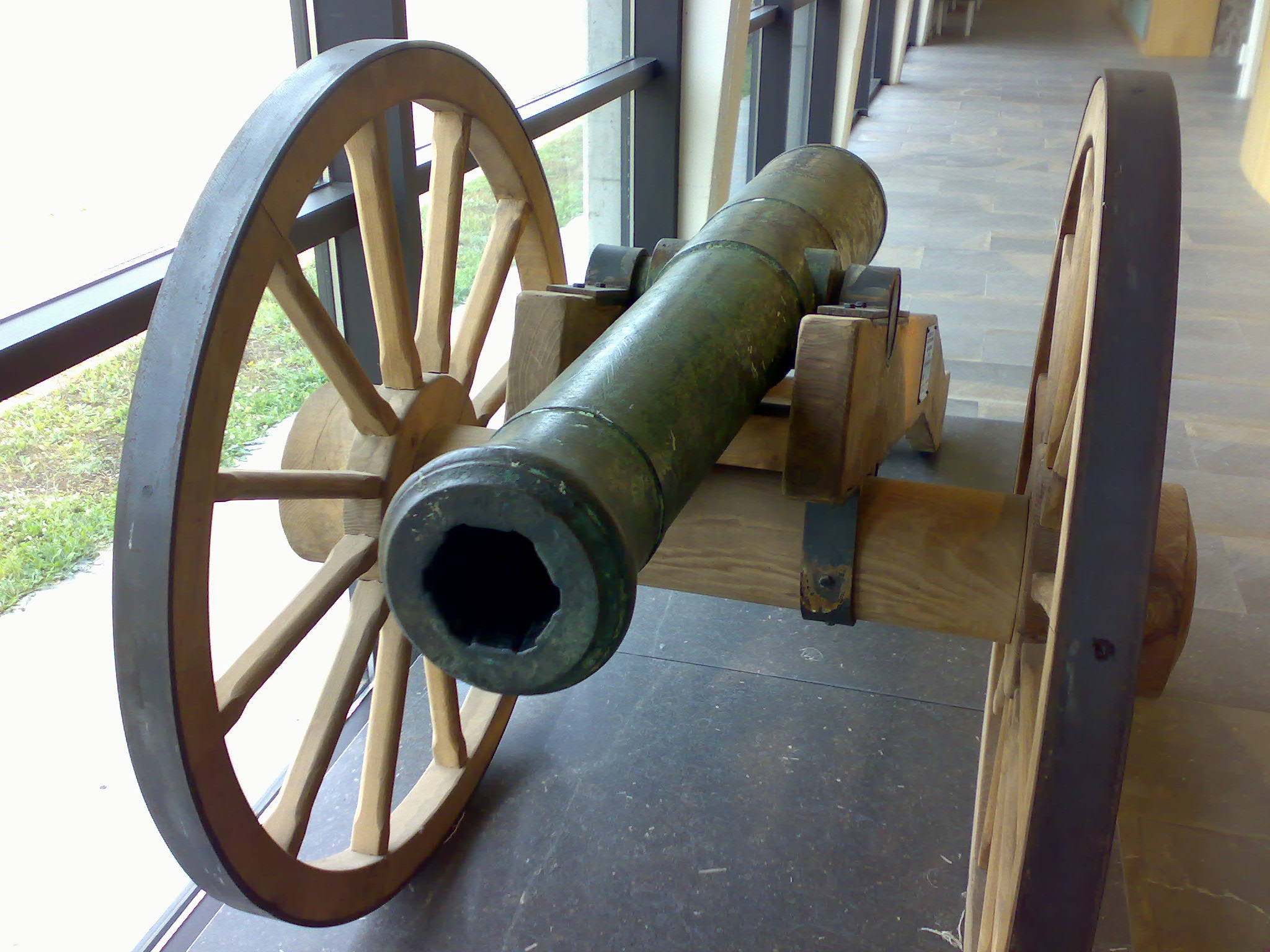 Vorderladerkanone mit gezogenem Lauf